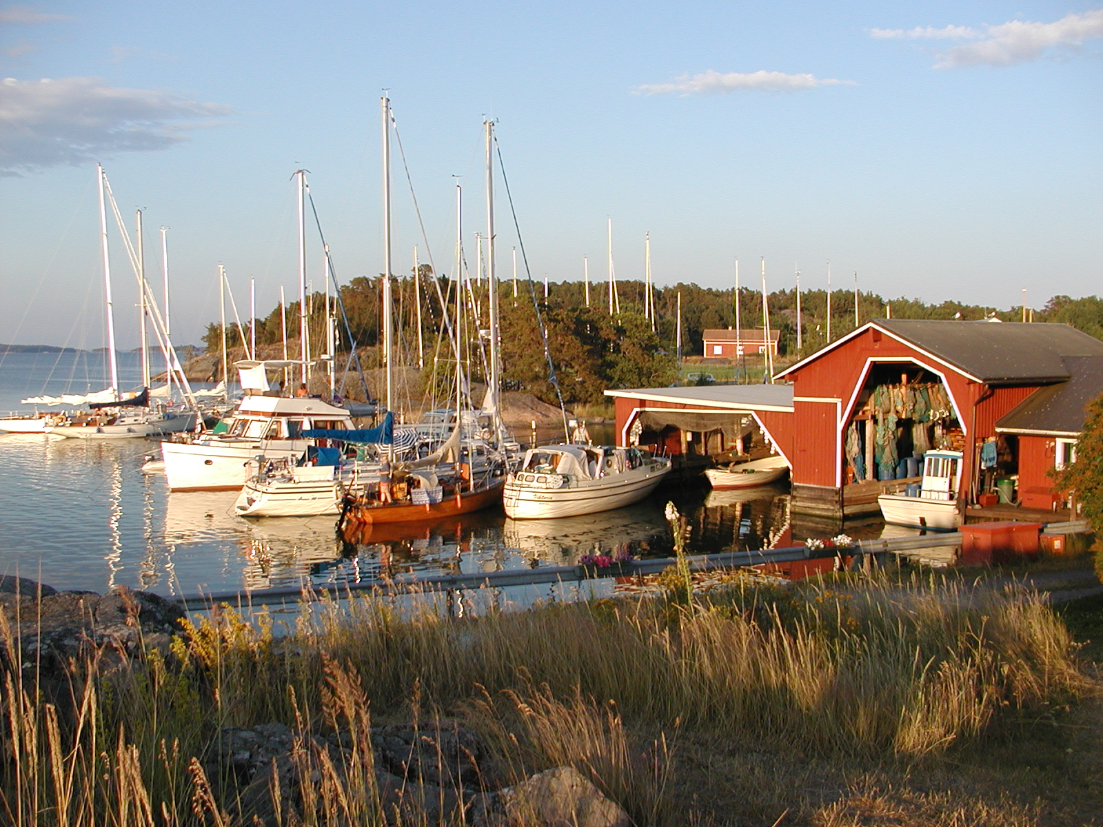 Gullkronas gästhamn. Bilden tagen av Kristian Bäckström 2005.